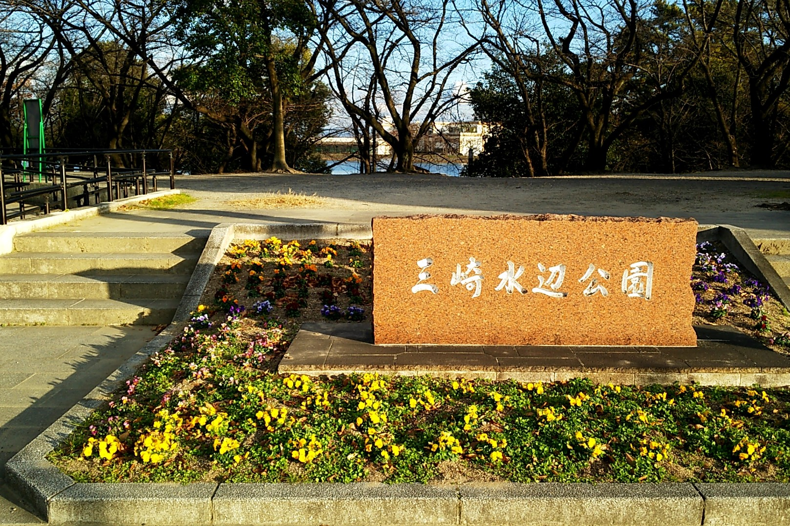 愛知県豊明市三崎町にある三崎水辺公園。